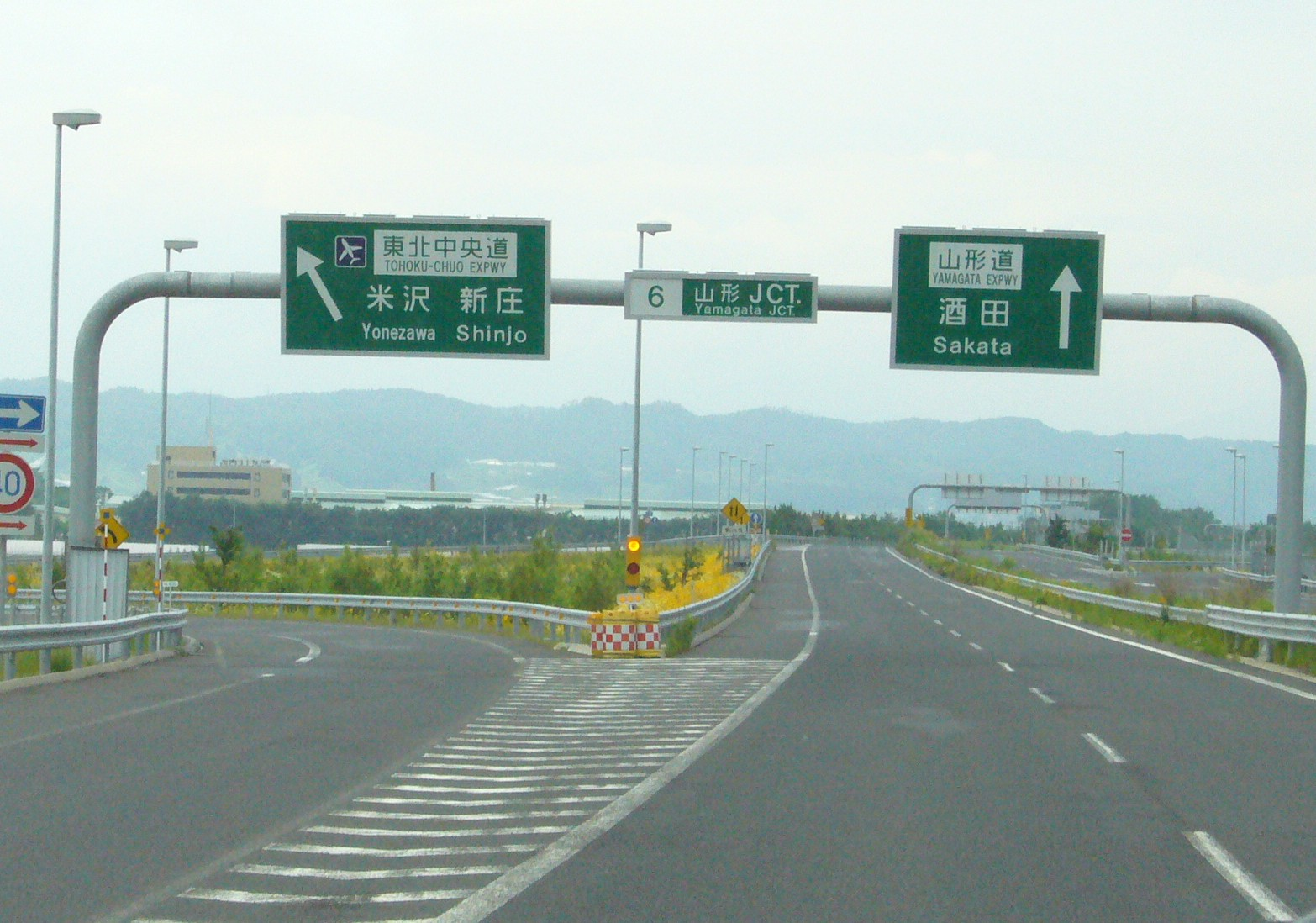 yamagata-JCT-yamagata-expressway,yamagata-city,japan